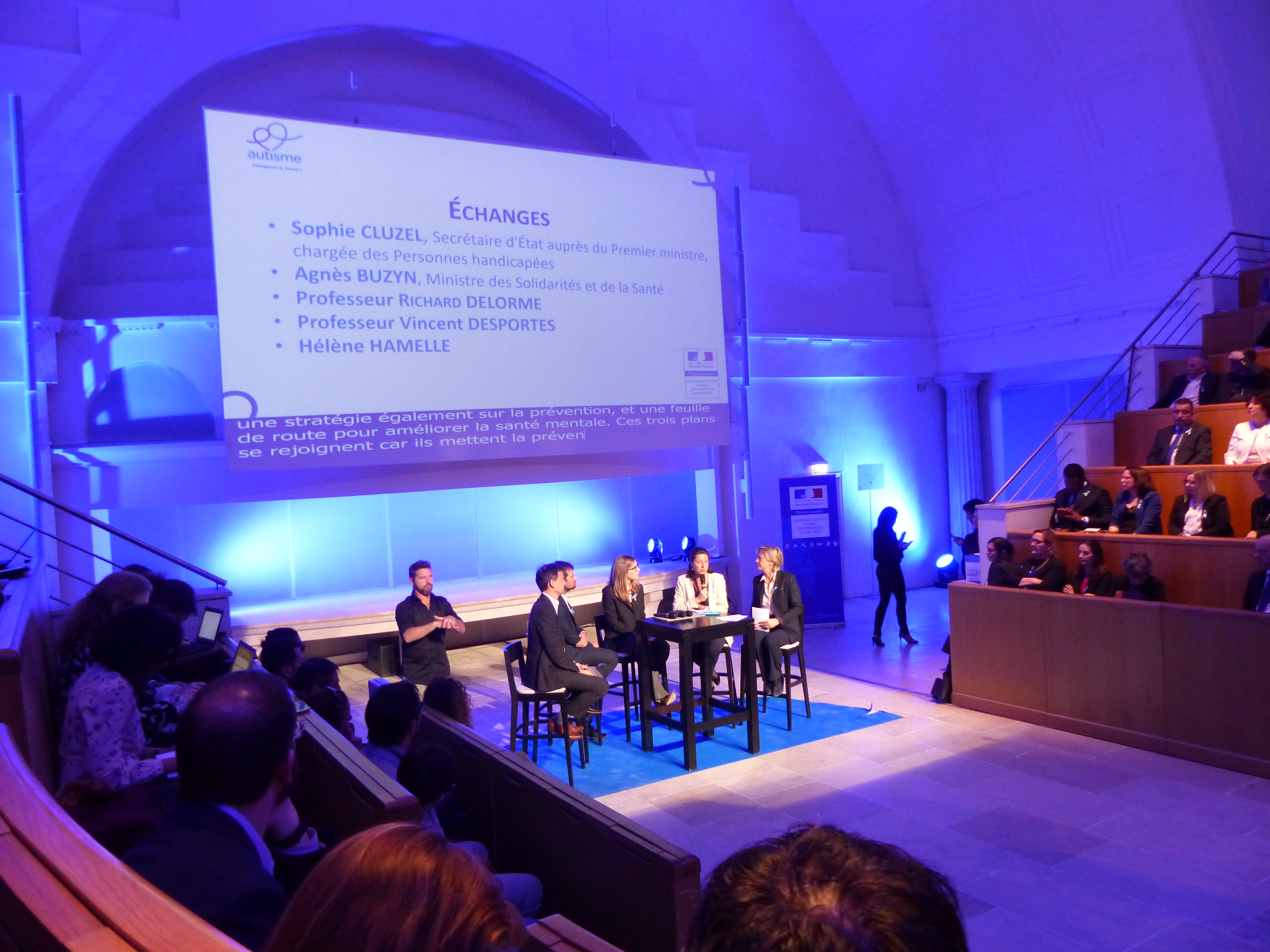 Lancement du 4e plan autisme (ou stratégie autisme) le 6 avril 2018.